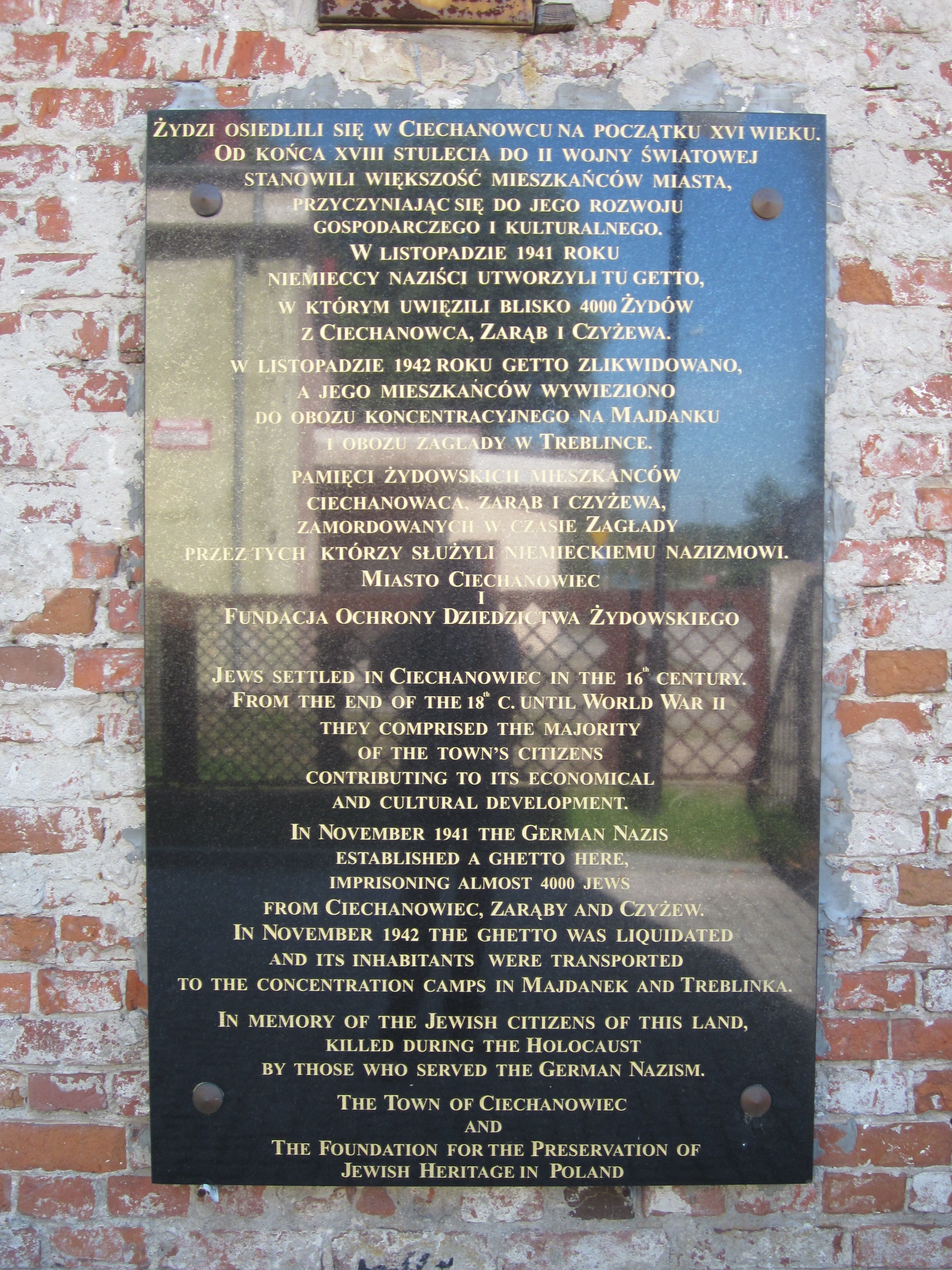 Tablica ta znajduje się na budynku dawnej synagogi przy ul. Mostowej 6 obecnie jest to Ciechanowiecki Ośrodek Kultury. Tablica została odsłonięta 4 listopada 2008 r. w 66 rocznicę likwidacji getta w Ciechanowcu. Na uroczystości tej był m.in. Naczelny Rabin Polski Michael Schudrich.